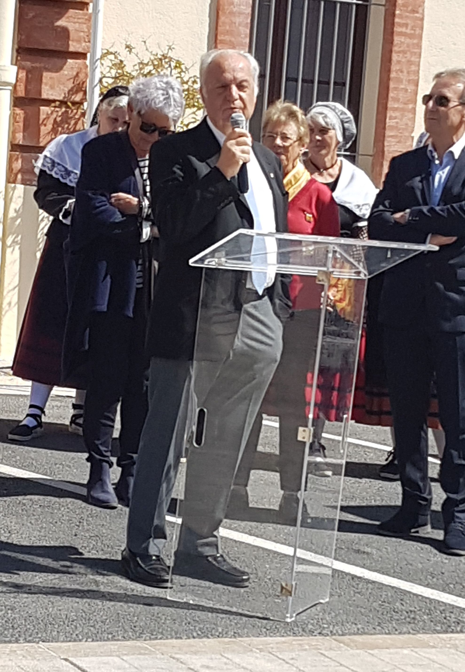 Discours de Fernand Siré pour l'inauguration de la place Jordi Barre devant la médiathèque de Canet-en-Roussillon